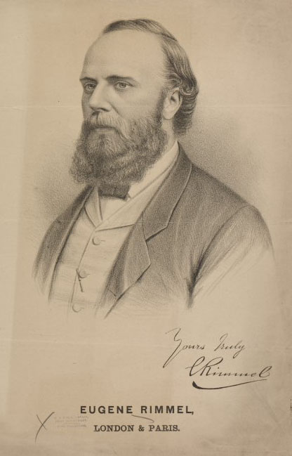 Portrait of Eugene Rimmel